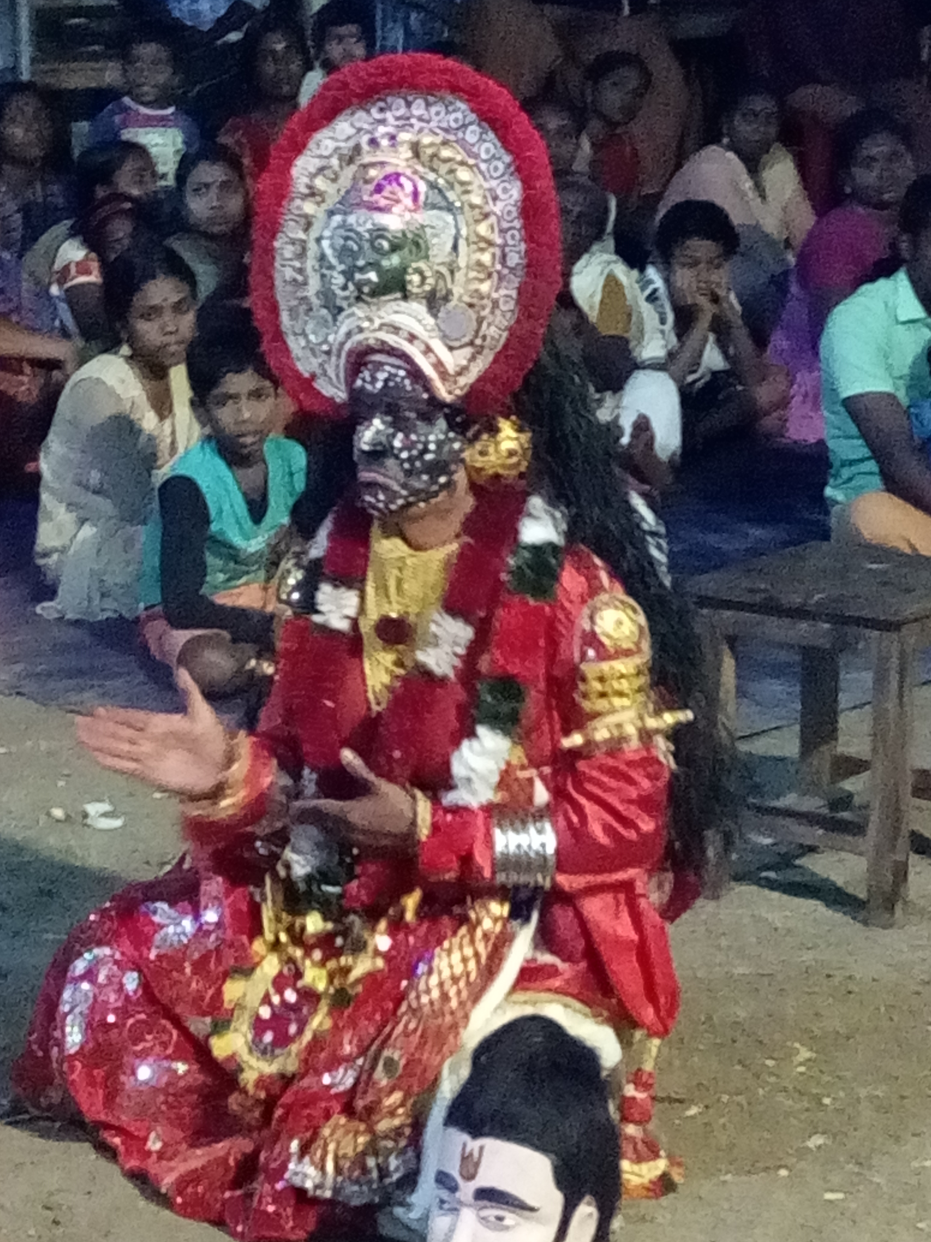 Bhadrakali theeyattu at kallumala on 1st march 2017